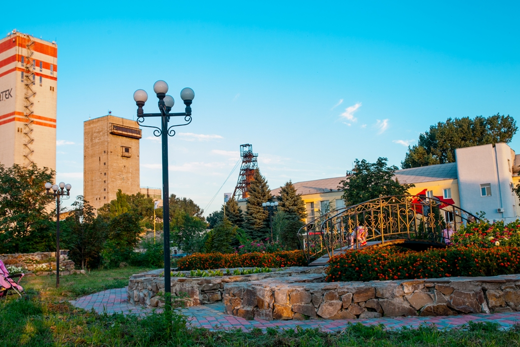 Шахта "Красний партизан"